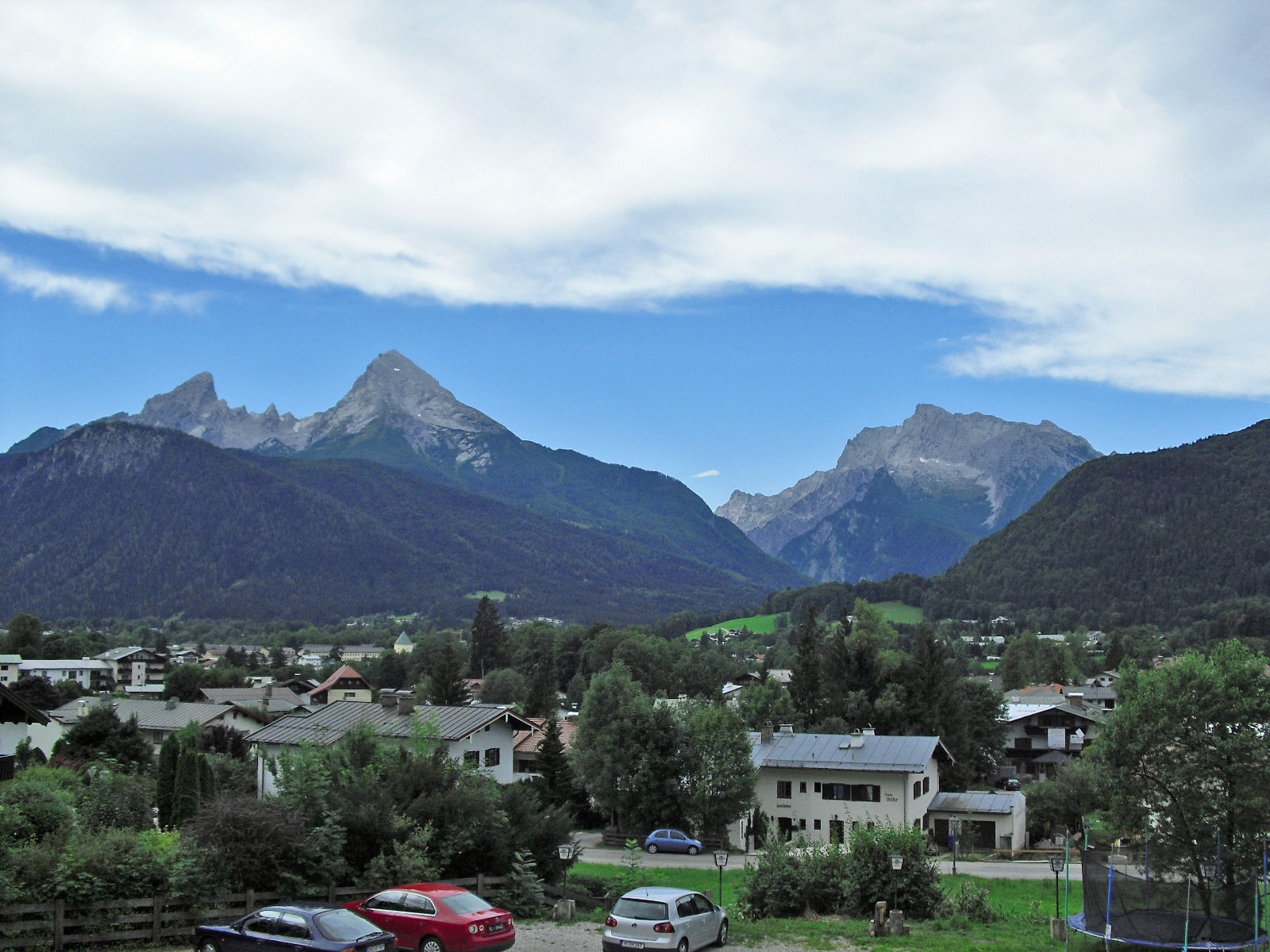 Bischofswiesen-Stanggaß mit Watzmannmassiv und Hochkalter